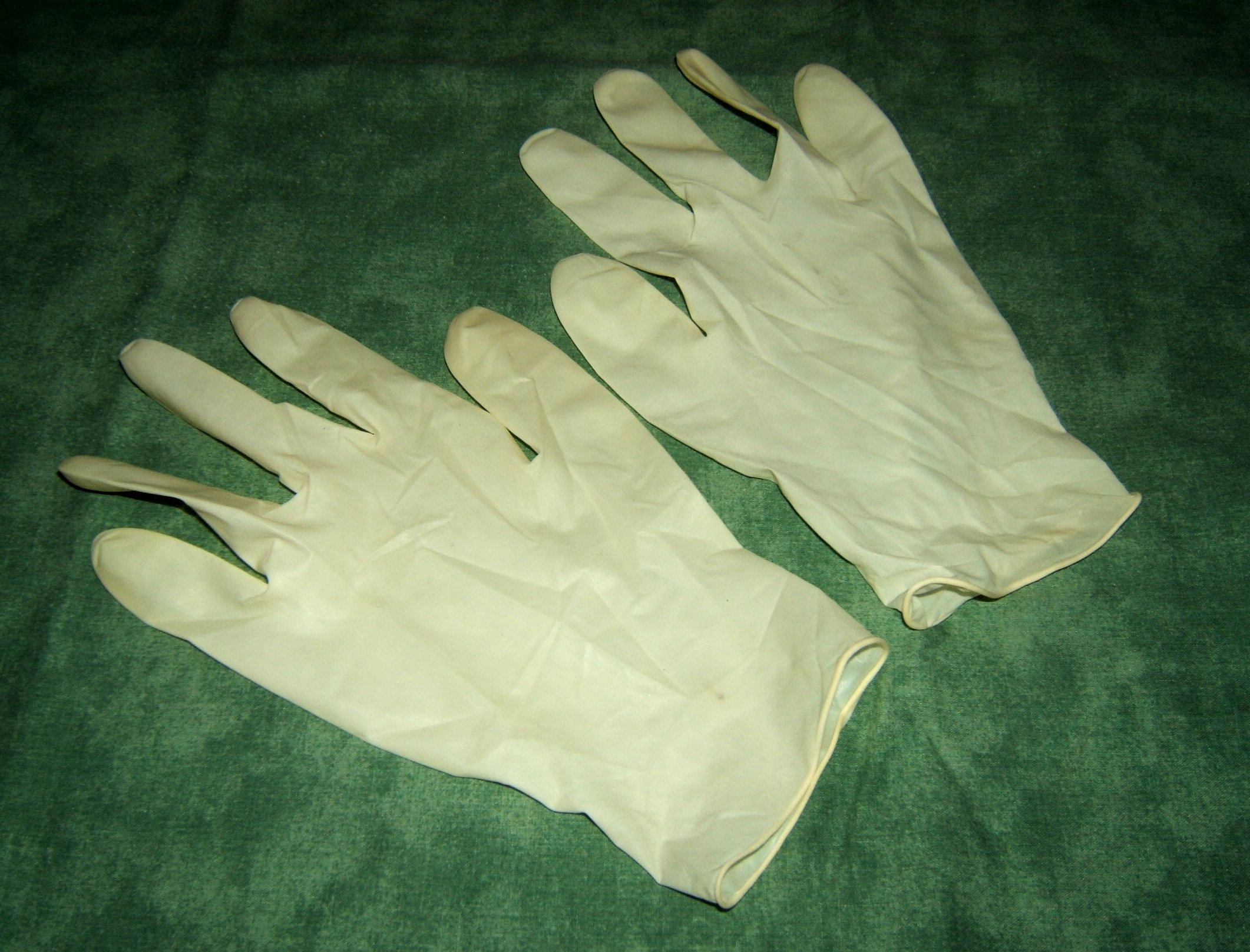 Rubberen handschoenen